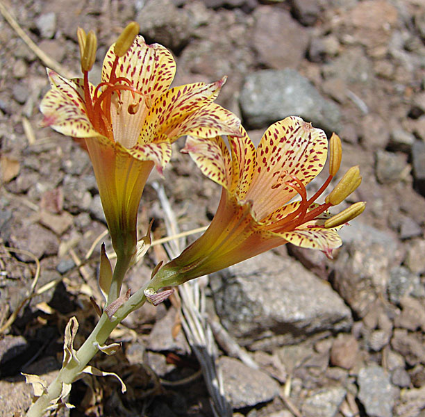 taxonomy:binomial="Alstroemeria versicolor" taxonomy:common=tigrina geo:lat=-35.156 geo:long=-70.382